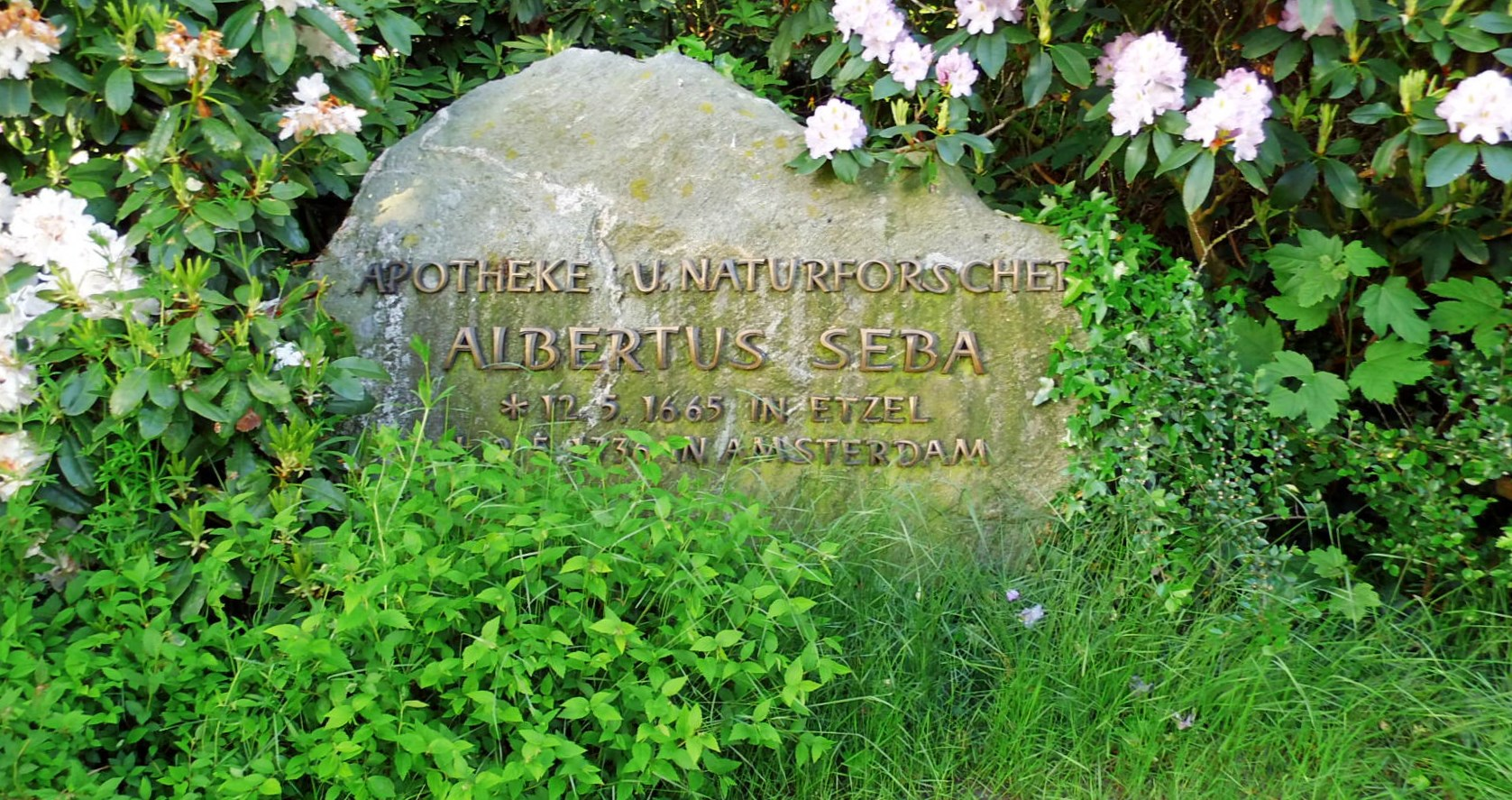 Gedenkstein für den Naturforscher und Apotheker Albert Seba. Er wurde in Etzel (Friedeburg) geboren und wirkte in Amsterdam